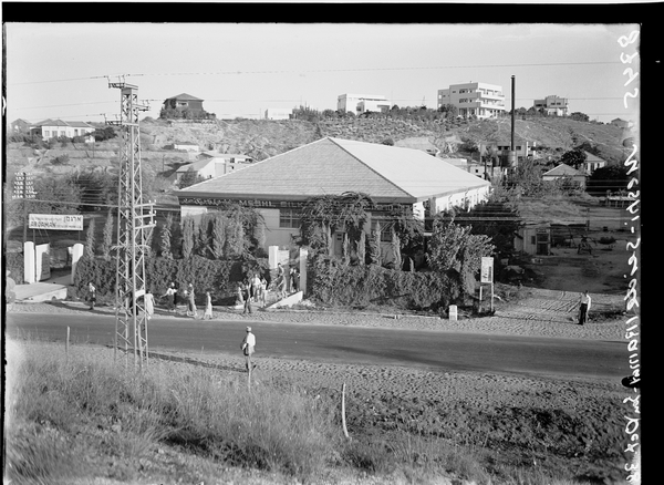 מפעל "משי זקס" בדרך ז'בוטינסקי 42, רמת גן. ברקע גבעת שאול. הוילה בראש הגבעה היא בית מוריס פישר, מצד שמאל ניתן לראות את בית הנחושת.